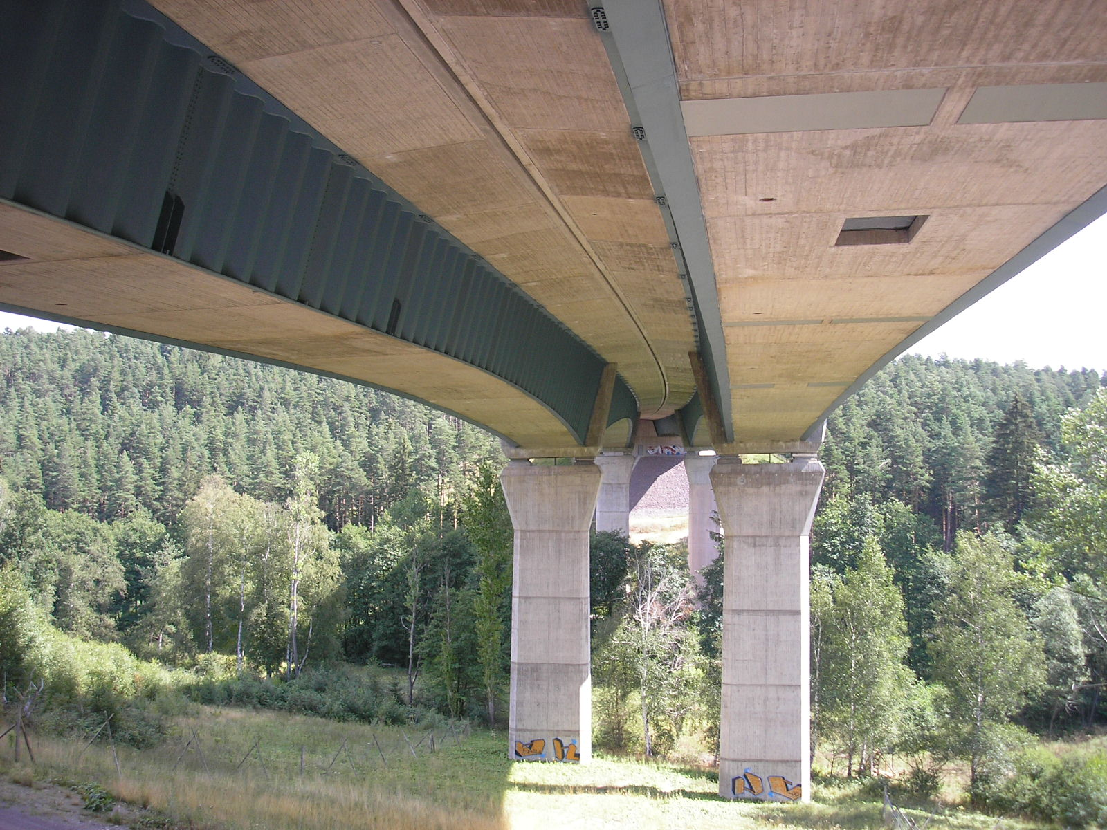 Talbrücke Altwipfergrund (A71) bei Ilmenau (Thüringen).